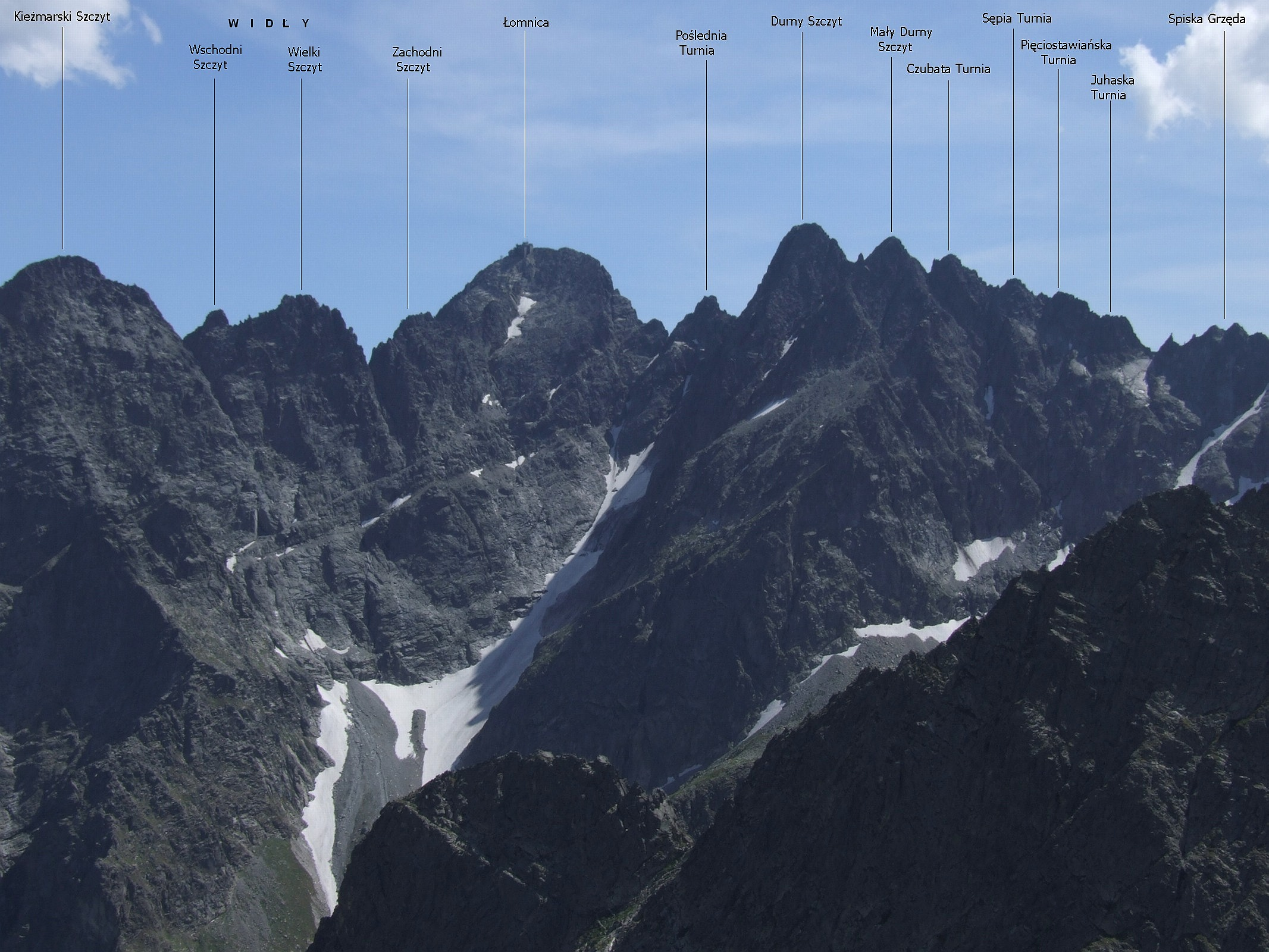 Szczyty grupy Łomnicy. Widok z Jagnięcego Szczytu